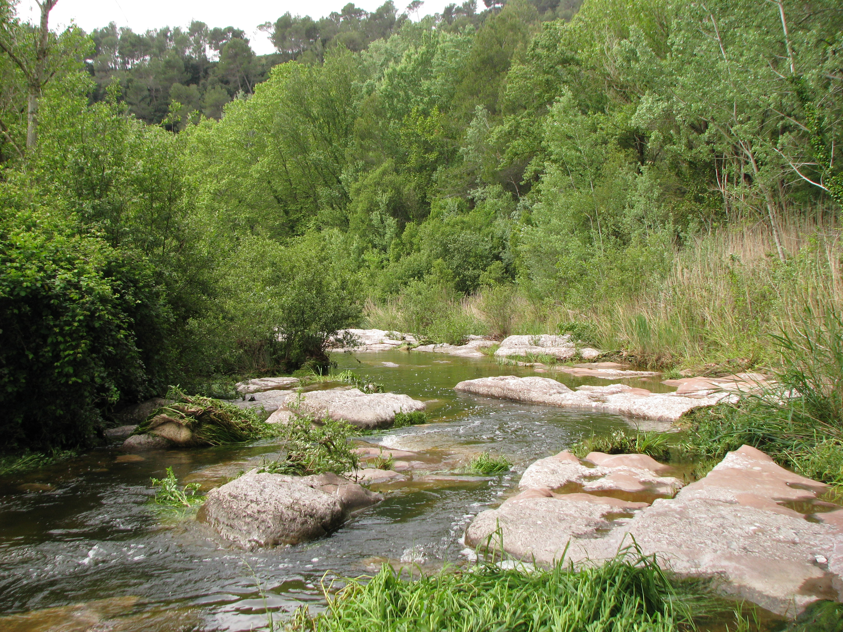 Río Ripoll a la altura de Les Arenes, término municipal de Castellar del Vallés.